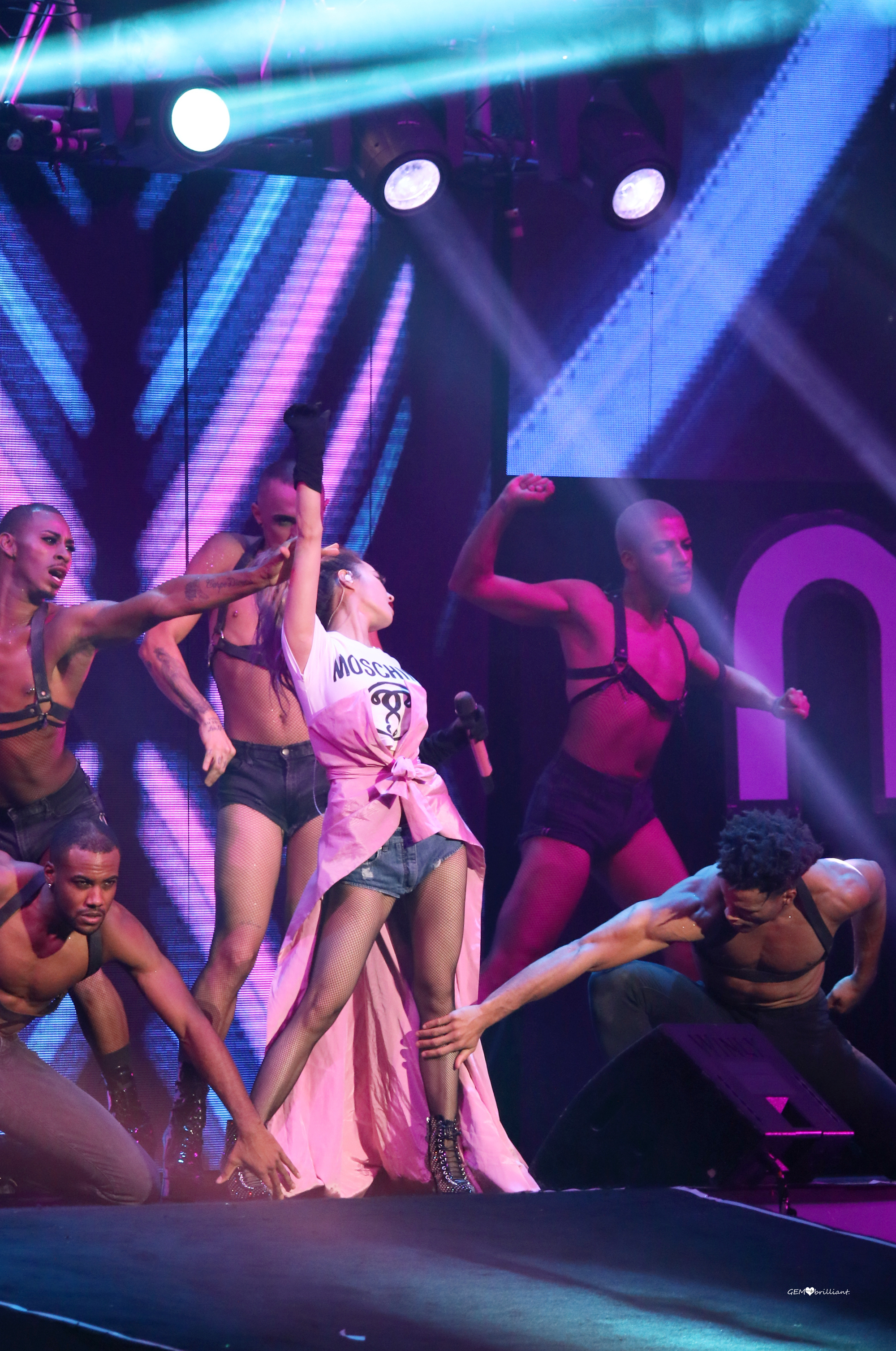 中文（中国大陆）: 20161203 第十届音乐盛典咪咕汇